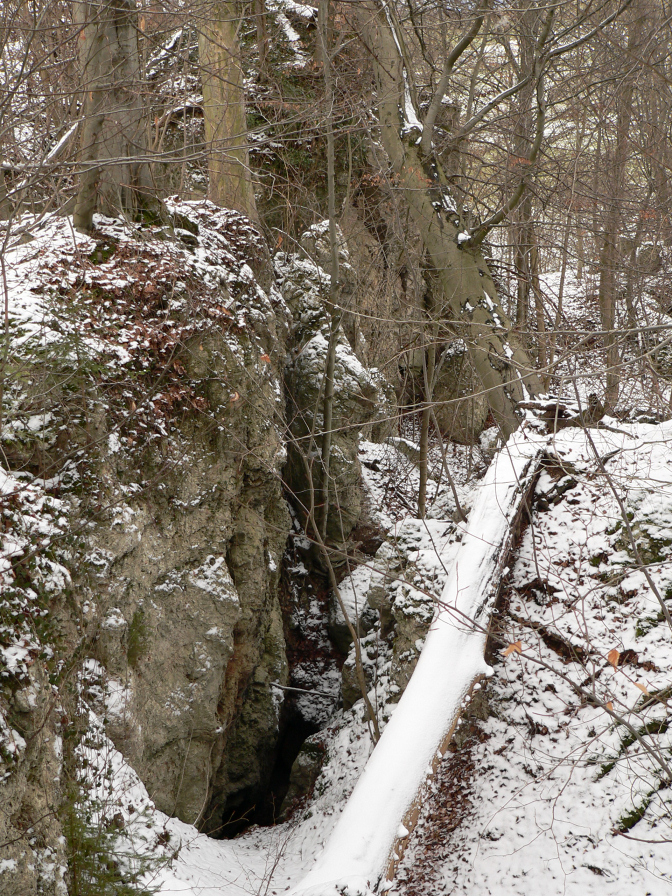 Umfeld des Eingangs der Marthahöhle